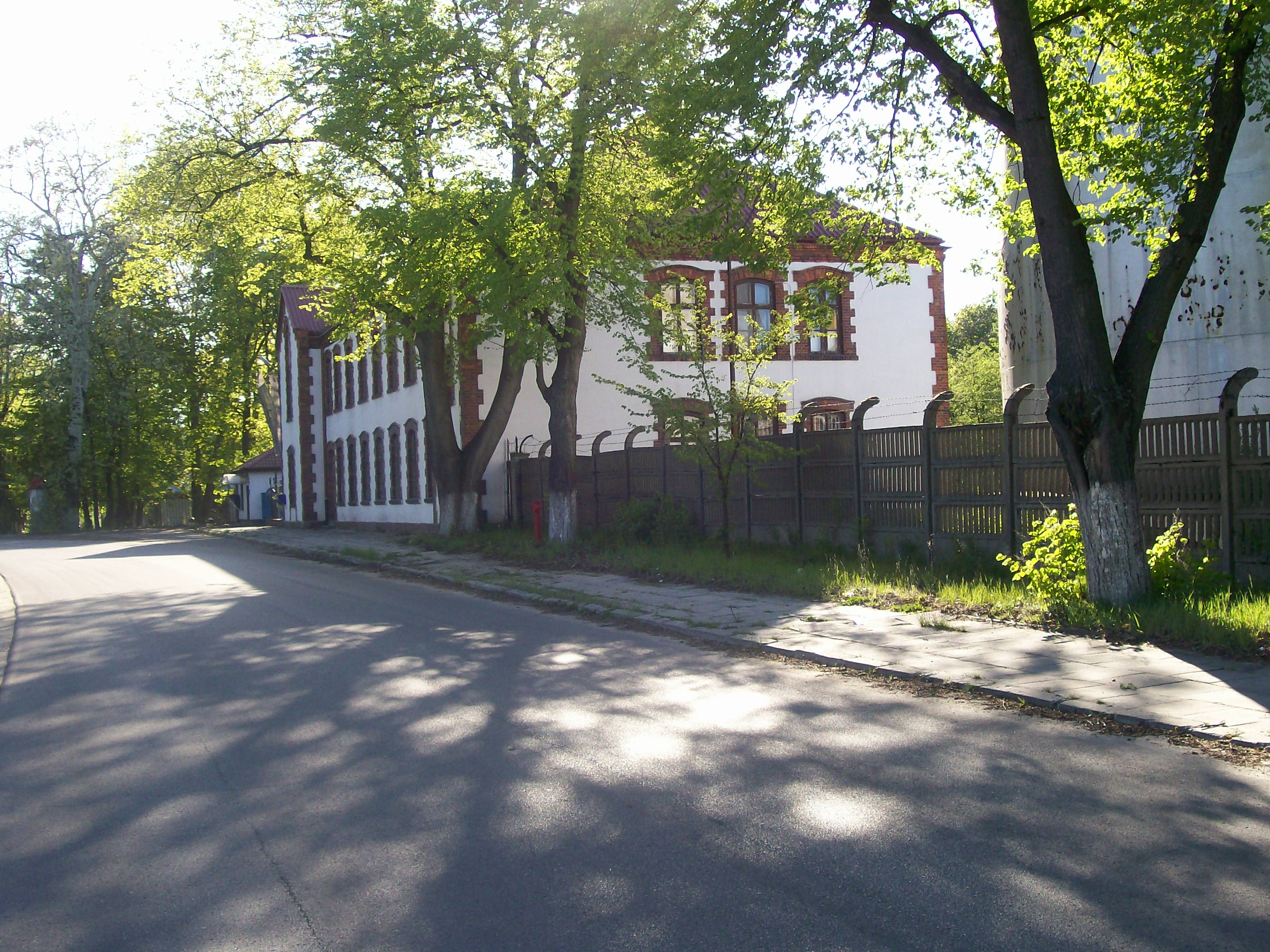 Niedzielsko - budynek administracyjny byłej cukrowni "Wieluń".